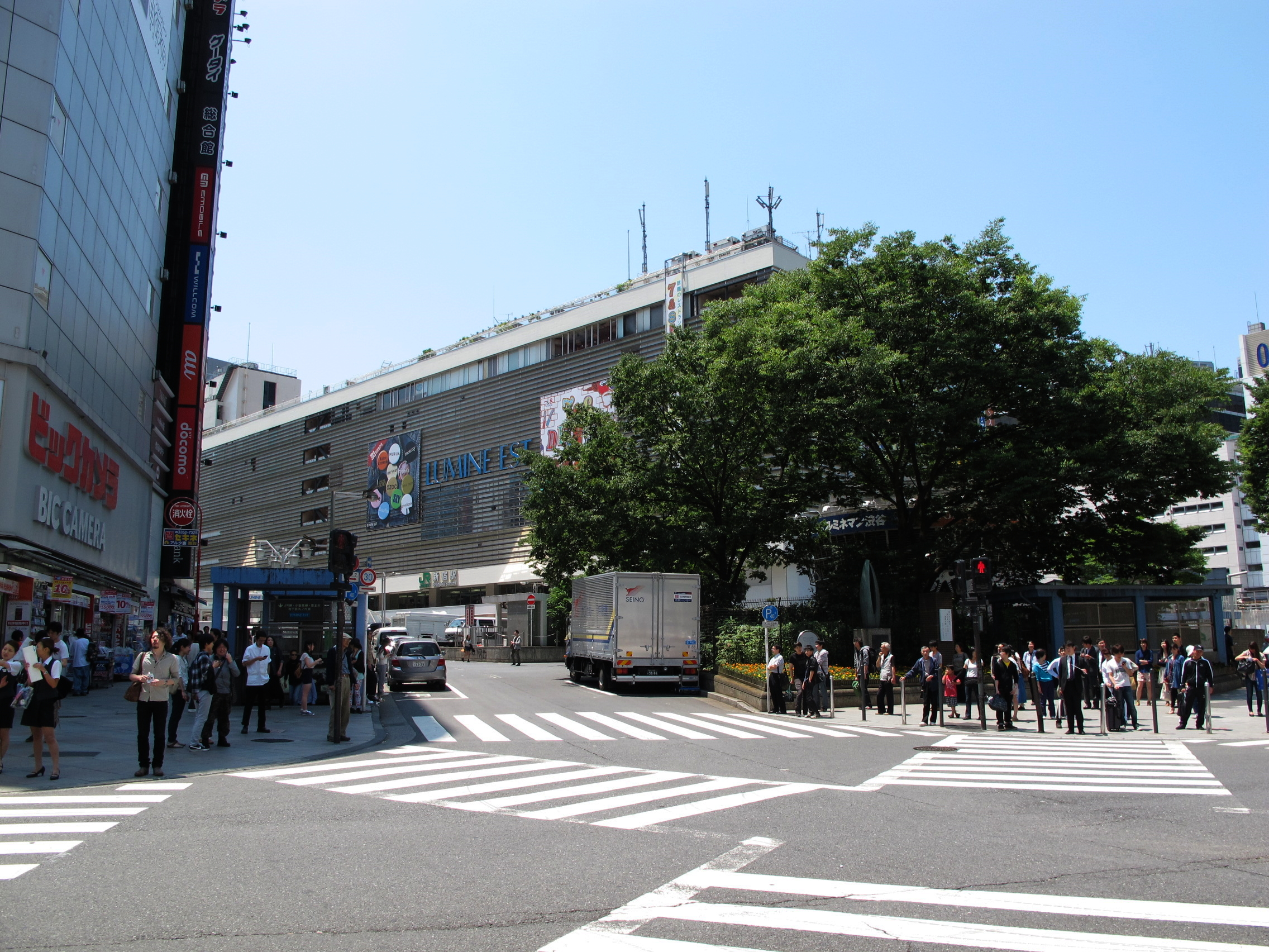 Lumine EST